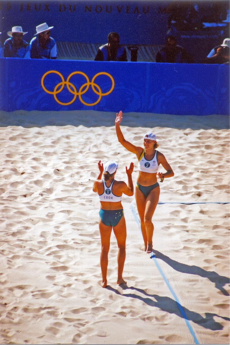 Womens beach volleyball